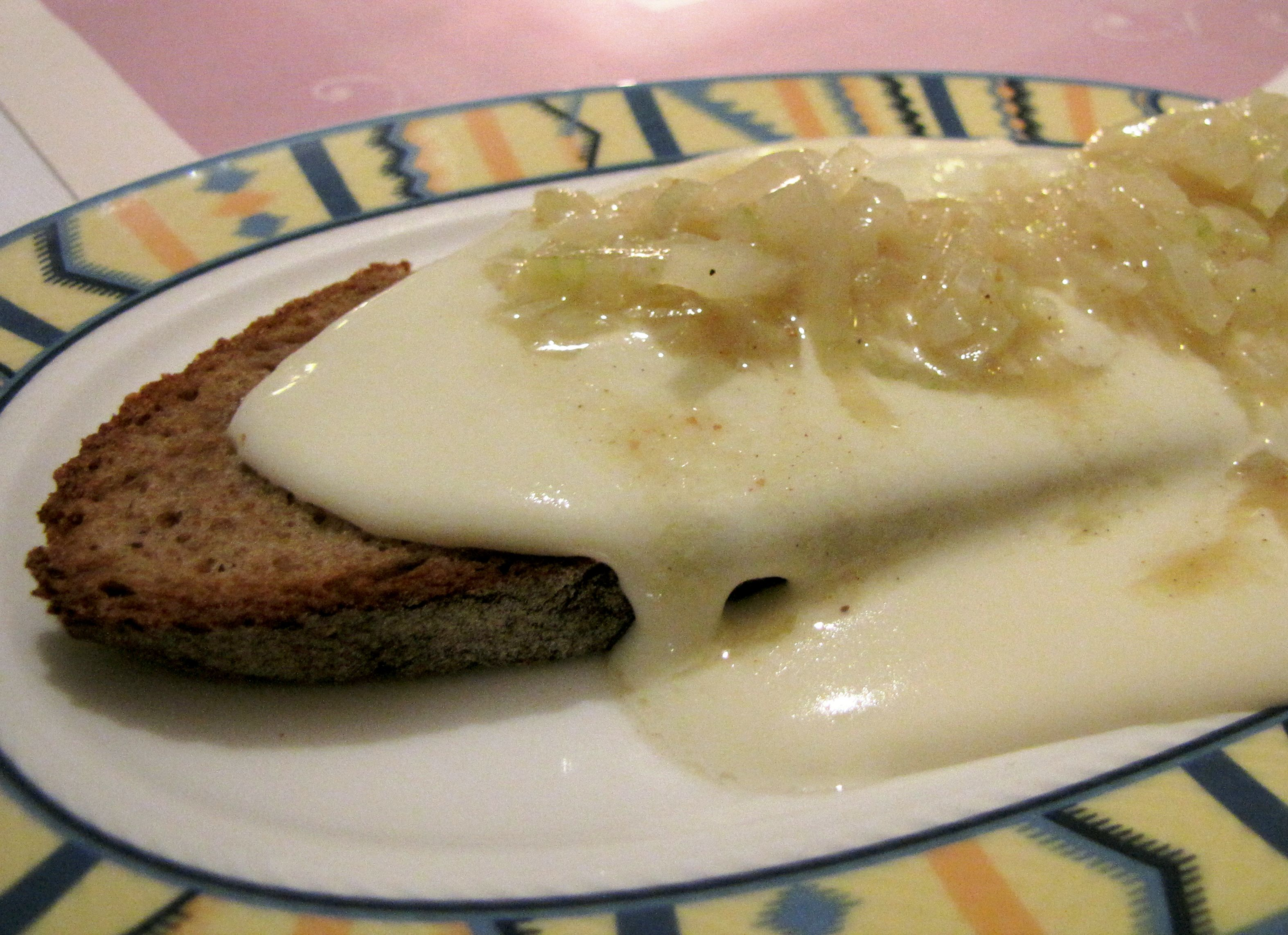 Kochkaese Musik, Zuschnitt geändert